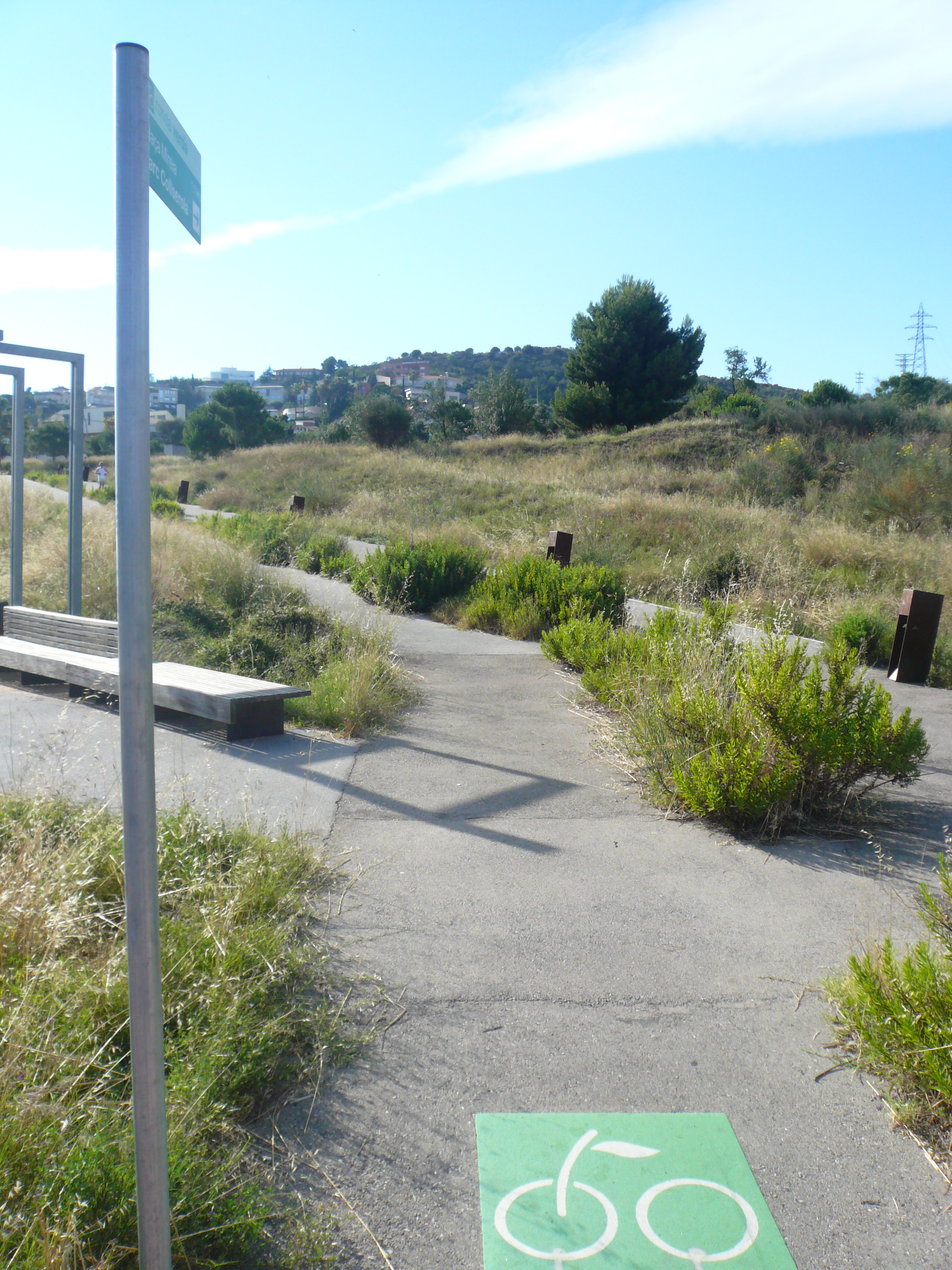 Ronda Verda a Esplugues de Llobregat This is a a photo of a natural area in Catalonia, Spain, with id: ES510066 Object location41° 26′ 24″ N, 2° 06′ 36″ E